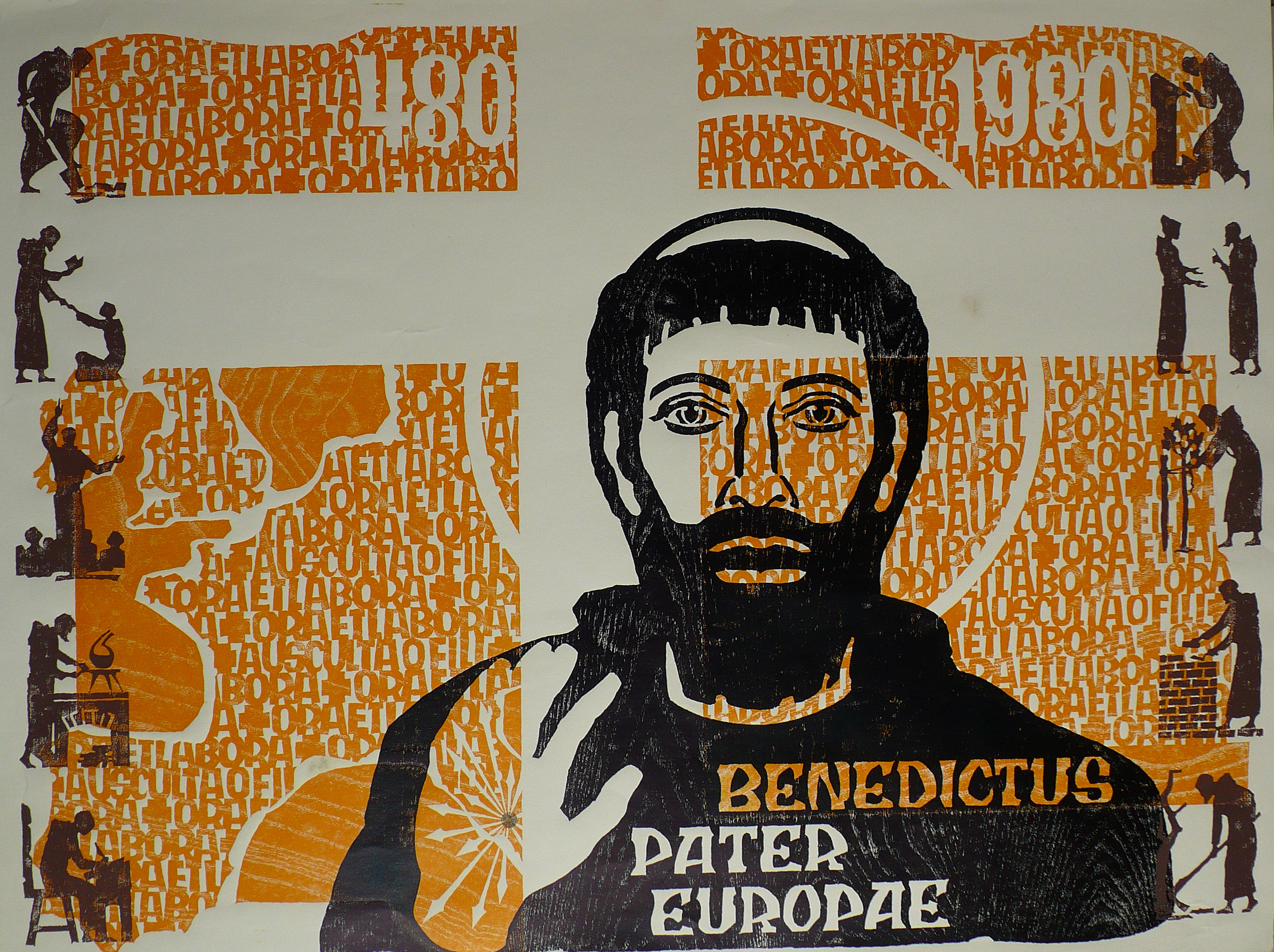 Eberhard Martin Schmidt, Benedictus Pater Europae, Holzschnitt, 1980